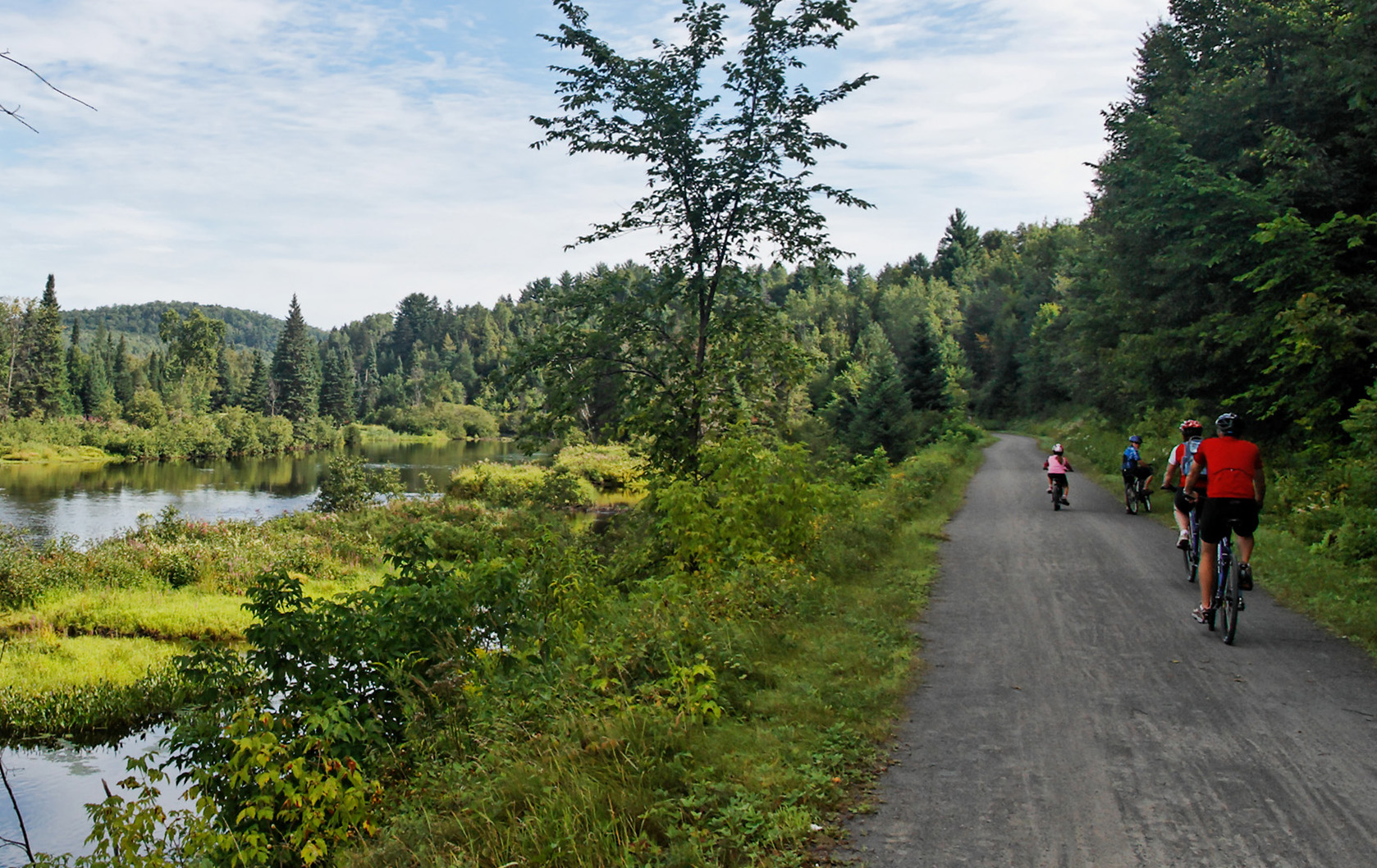 Parc linéaire du P'tit train du nord, Laurentides, Québec.